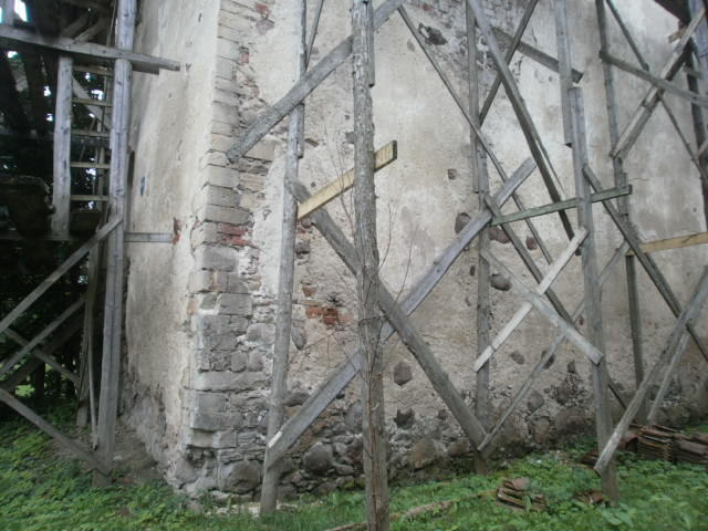 Vaade peatorni kirdenurgale ja põhjaseinale.